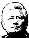 Maung_Gyi2.jpg